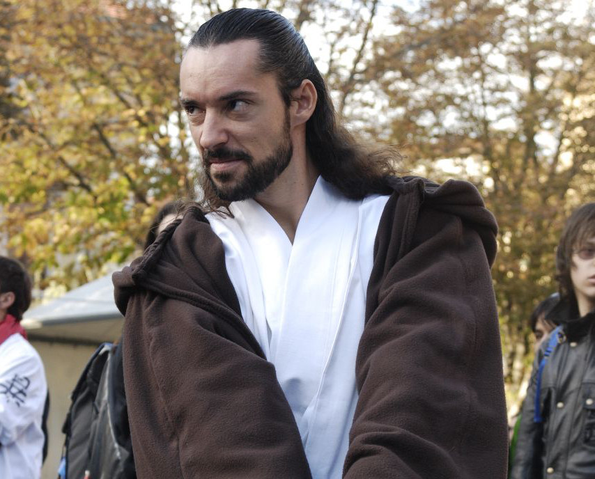 Qui-Gon Jinn cropped